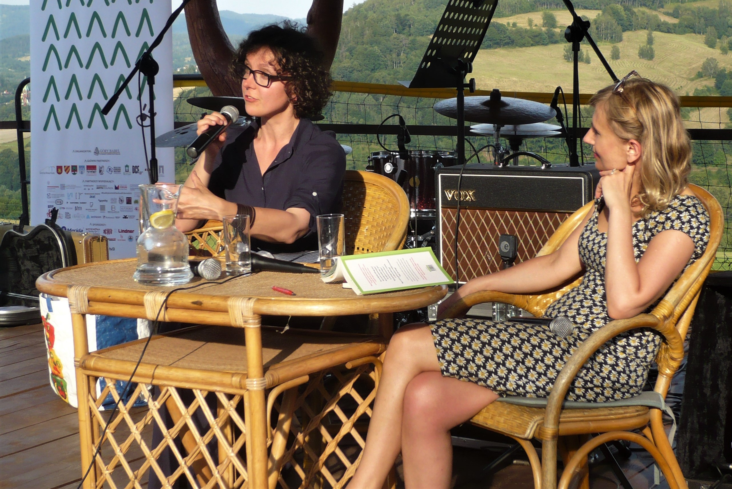 Urszula Zajączkowska, Justyna Sobolewska, Festiwal Góry Literatury, 2019